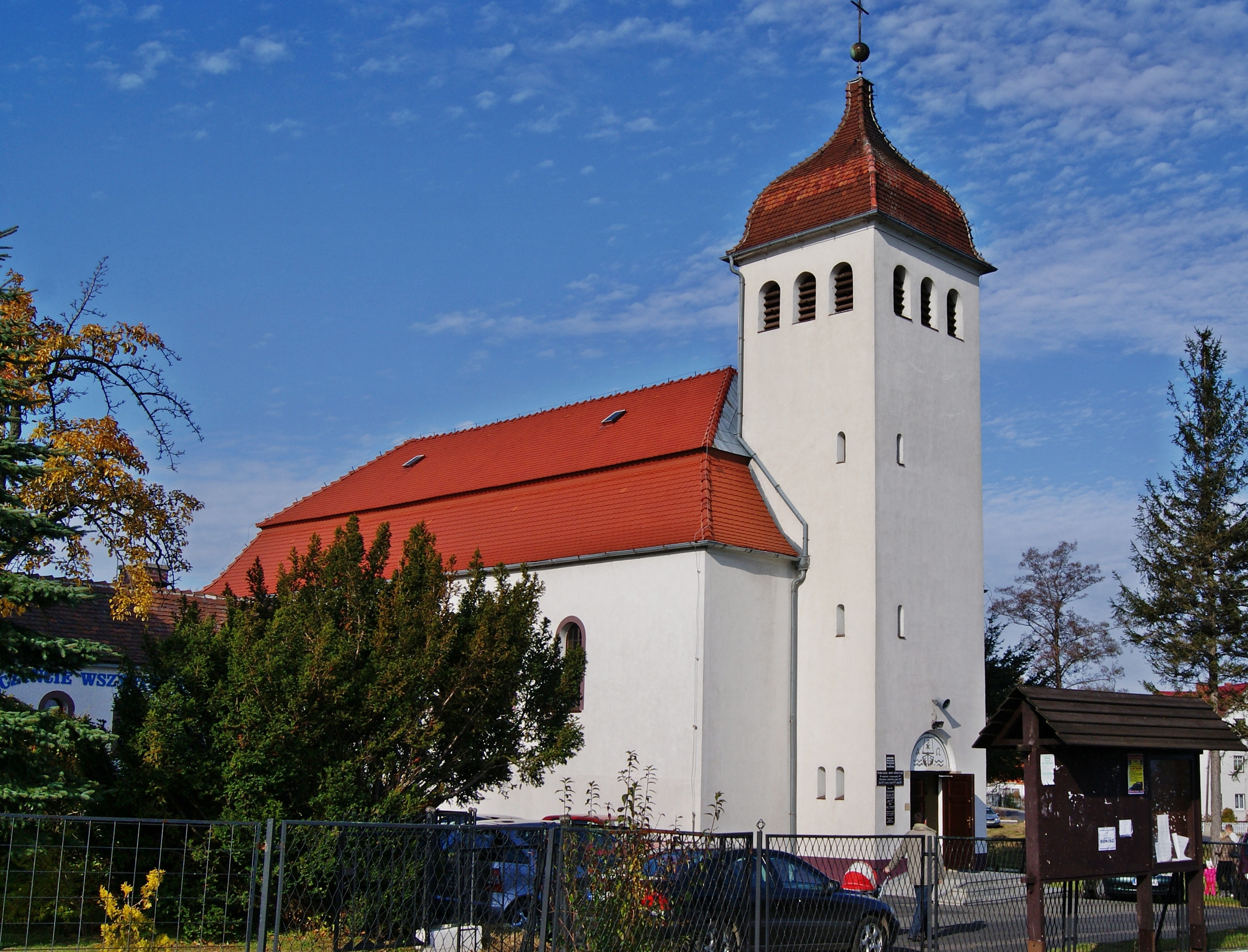 Czerniawa-Zdrój - kościół pw. Podwyższenia Krzyża z 1934-37 r. (zabytek nr 340/1340/J z 3.08.98)